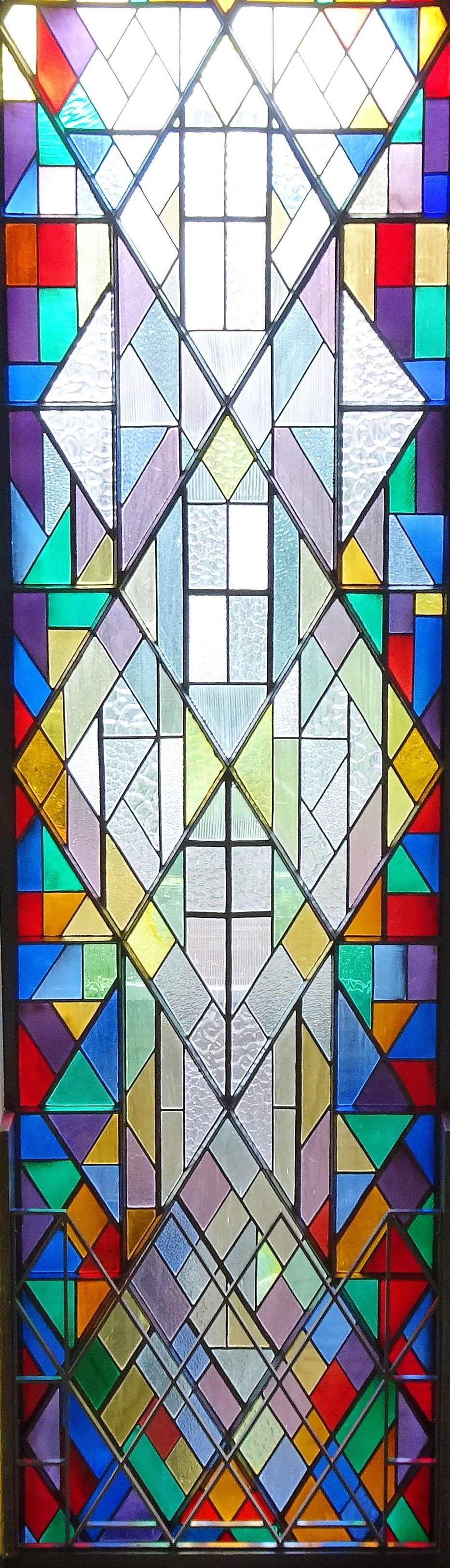 Deel van het Art Nouveau glas-in-loodkunstwerk van Vilmos Huszár in het hoofdtrappenhuis van het hoofdkantoor van F.W. Braat in Delft